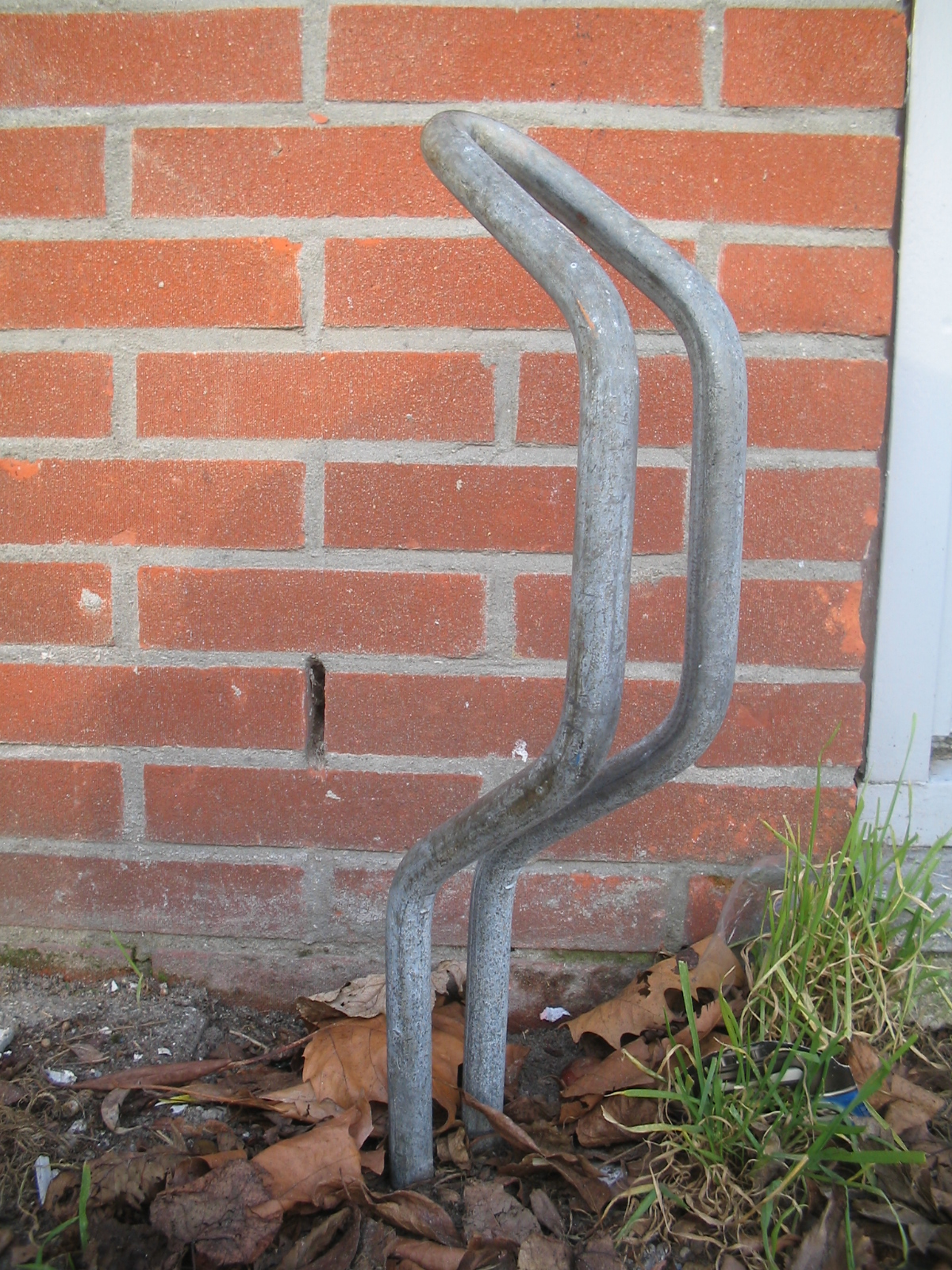 Fietsklem, Delft